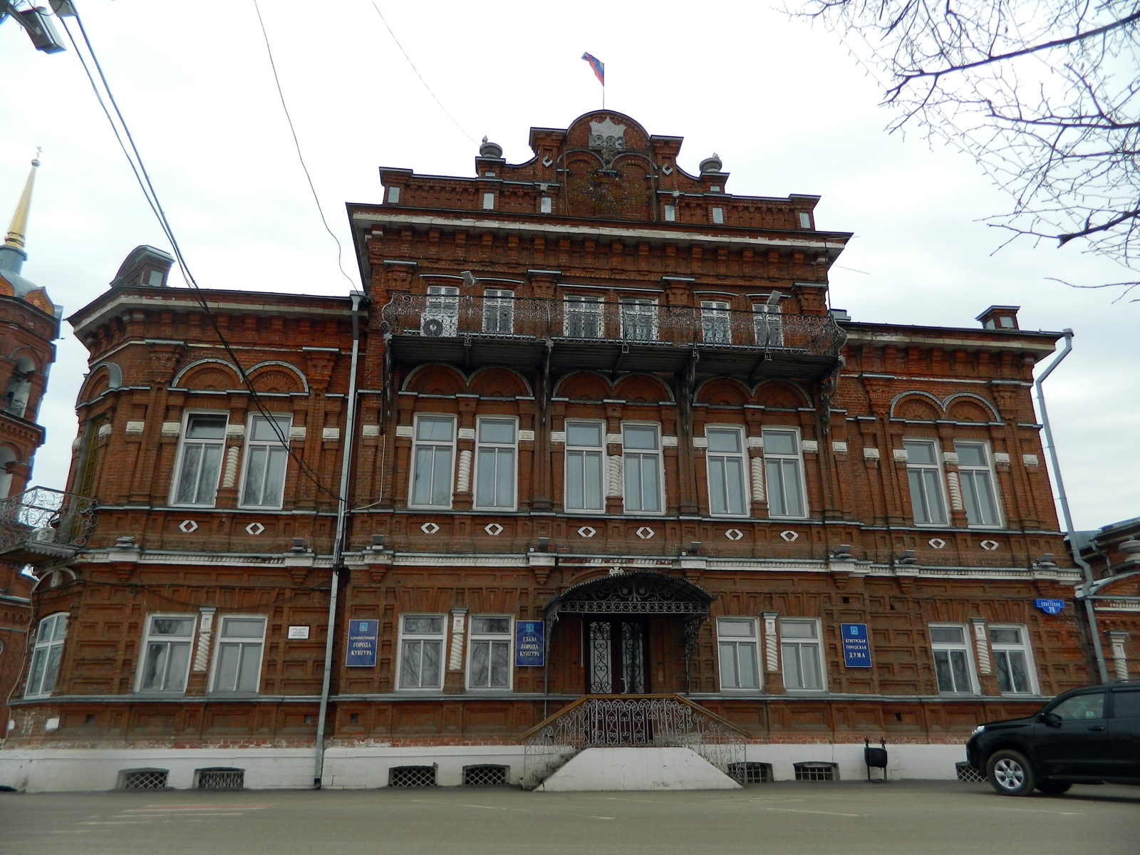 Особняк Дубинина (Кунгур)